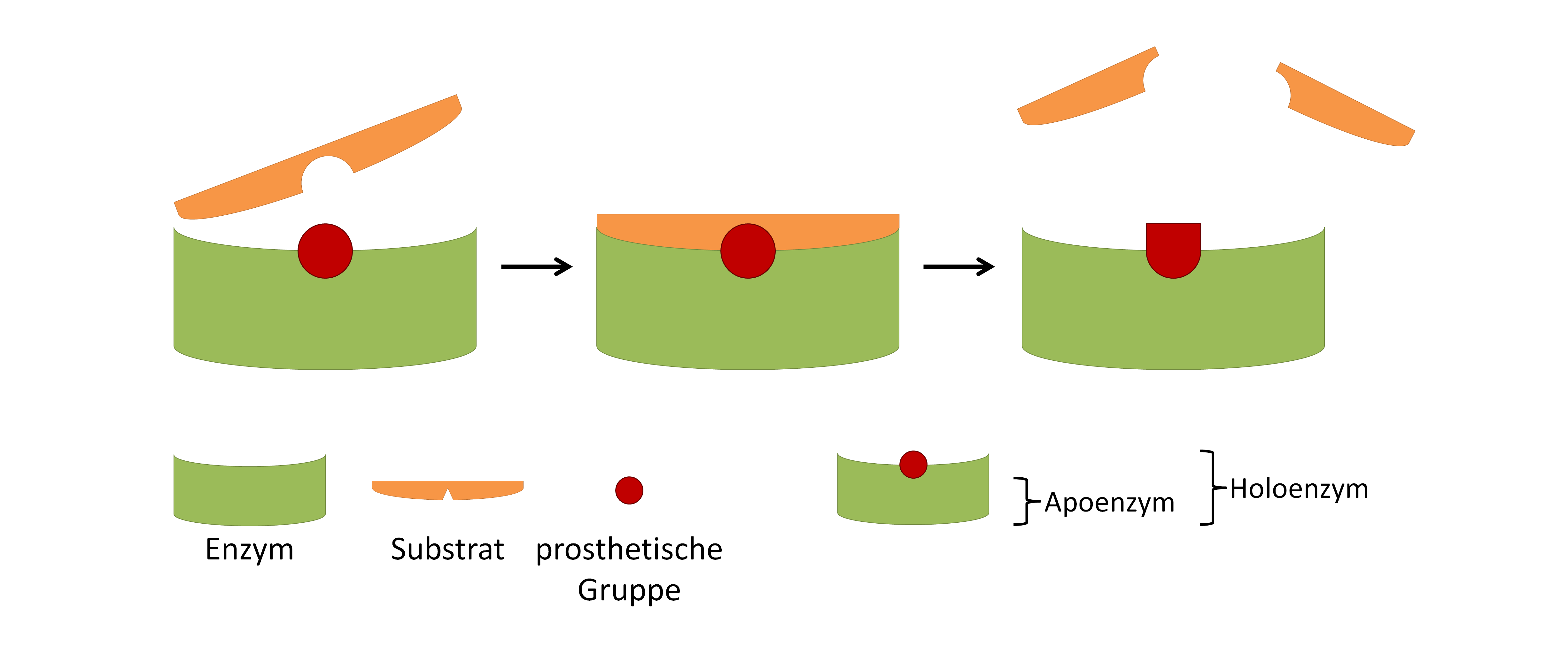 Schema der Arbeitsweise eines Enzym mit prosthetischer Gruppe